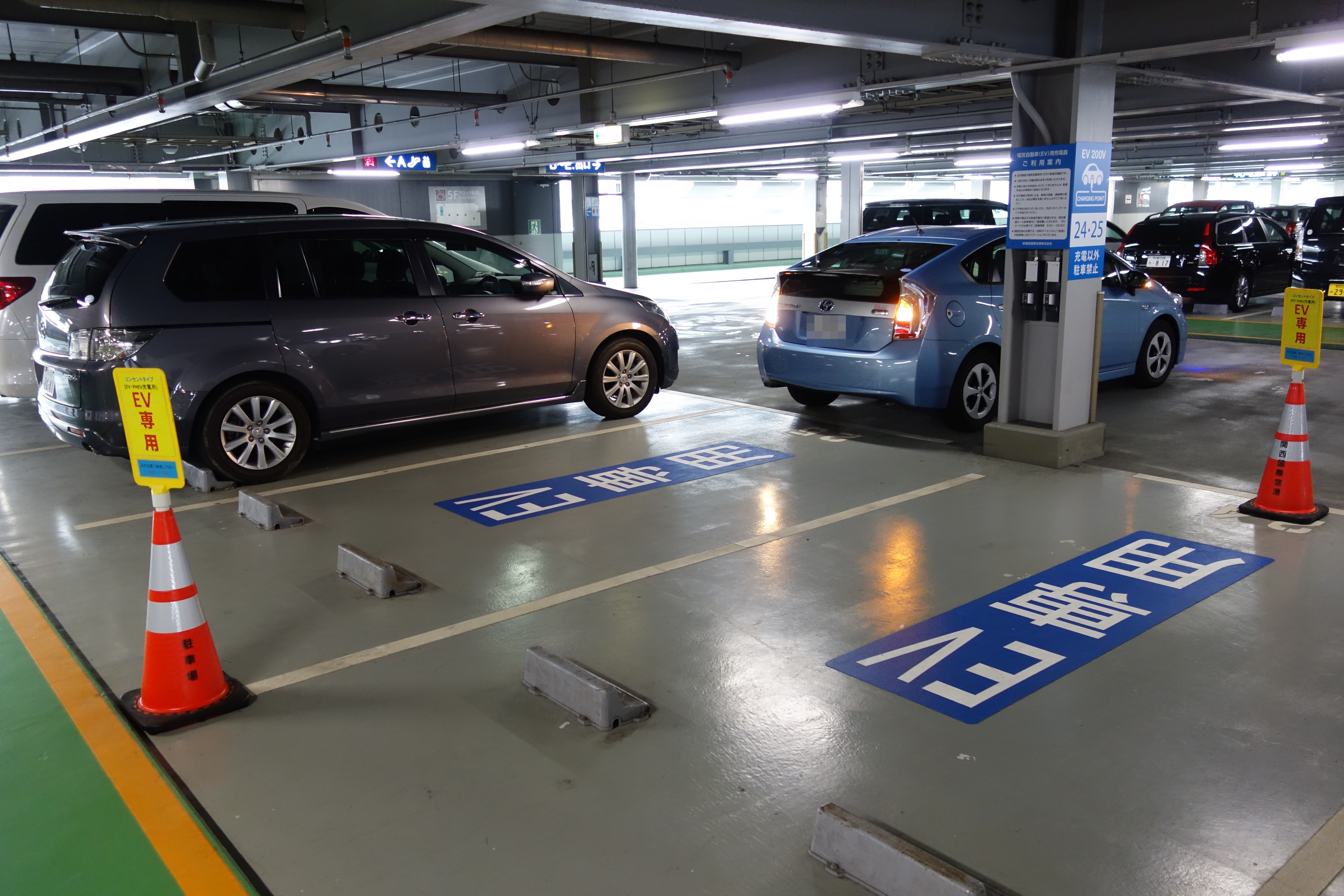 関西国際空港 P1 200V普通充電区画